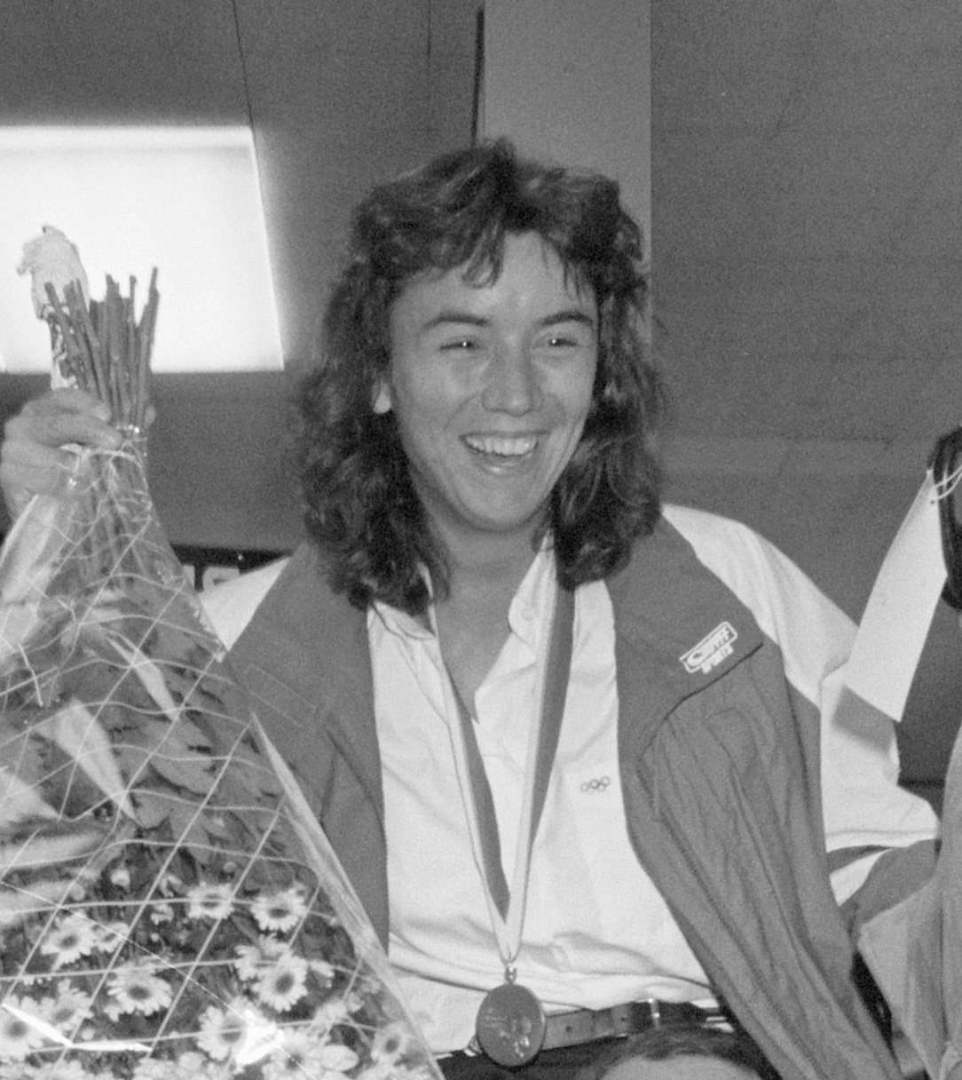 Aankomst op Schiphol van Mandy de Jongh , winnares zilveren medialle taekwondo op Olympische Spelen (demonstratiesport)